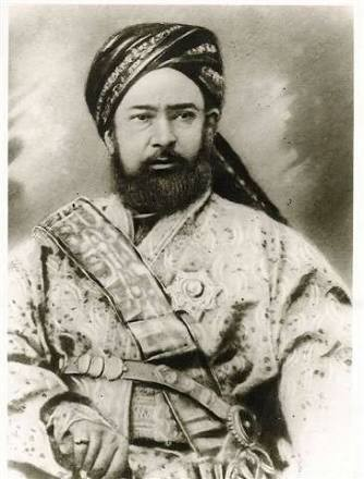 ЯкубБек